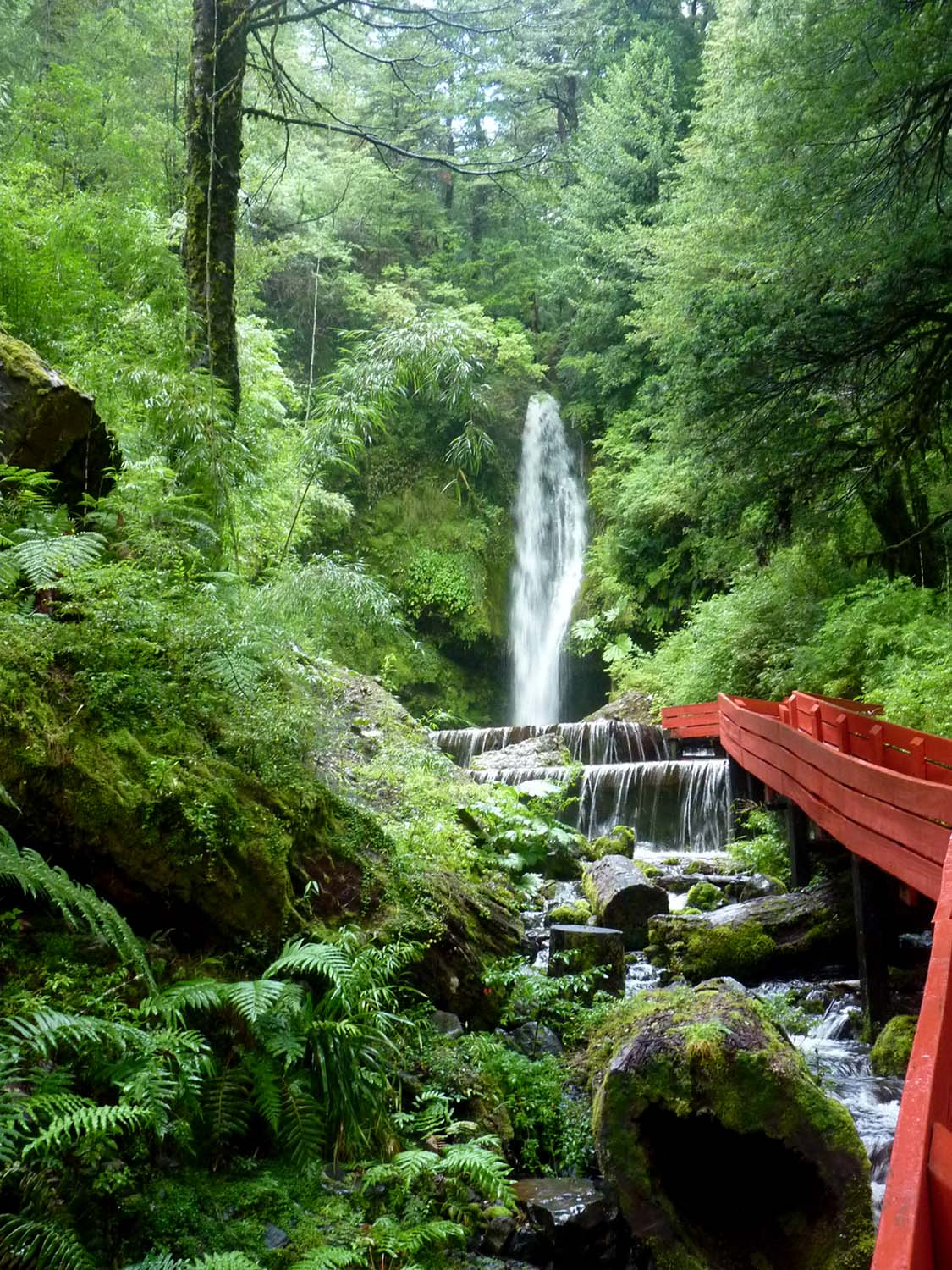 Termas Geometricas cerca de Coñaripe, región de los lagos, 10. región